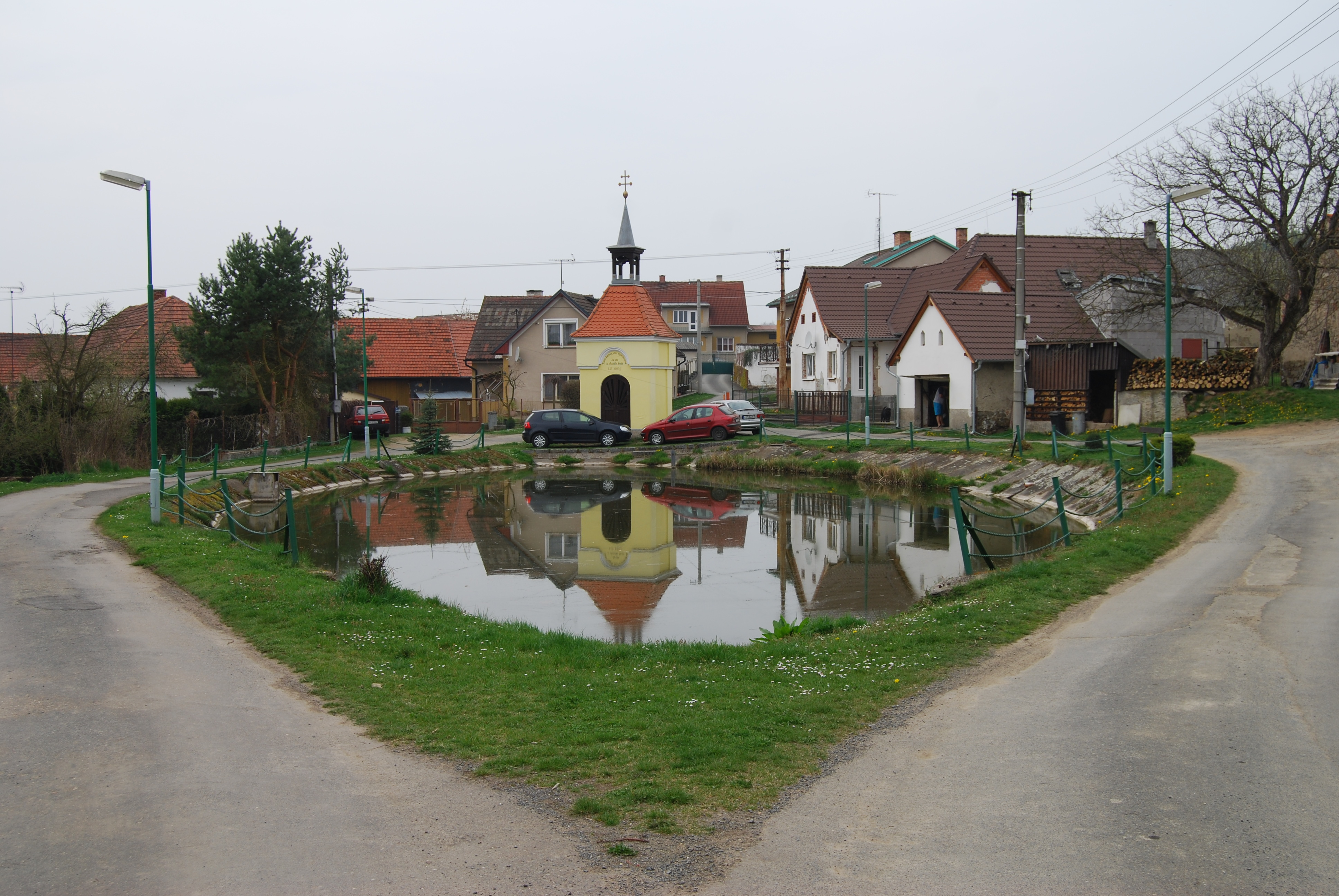 Pohled na náves s kaplí a s rybníkem. Žďár (Radíč). Okres Příbram. Česká republika.